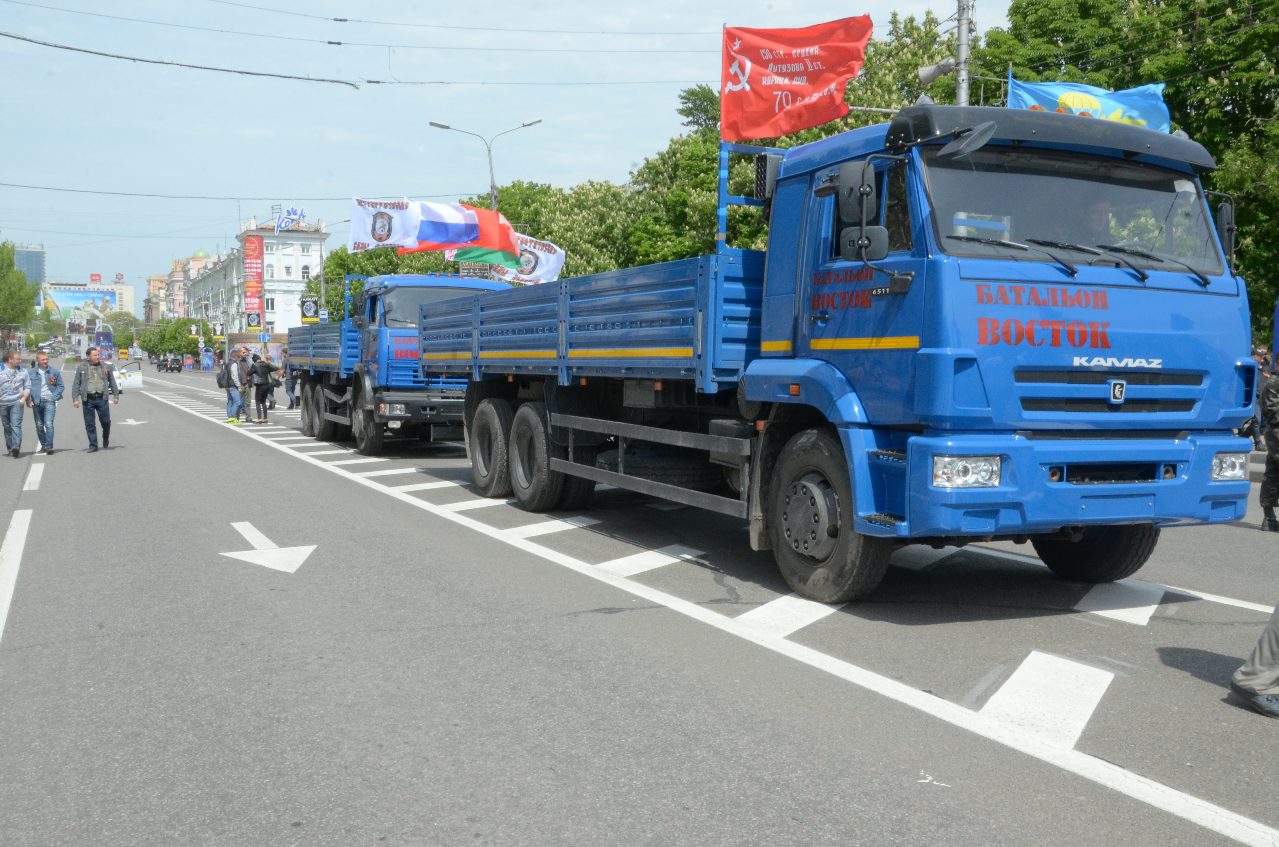 День Победы в Донецке